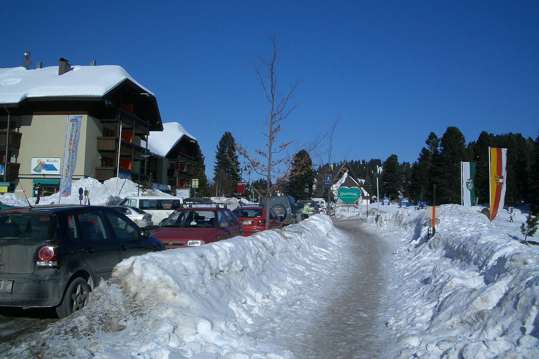 Turracherhöhe Ortsmitte; im Hintergrund Landesgrenze-Schild, rechts Landesfahnen Steiermark, Kärnten